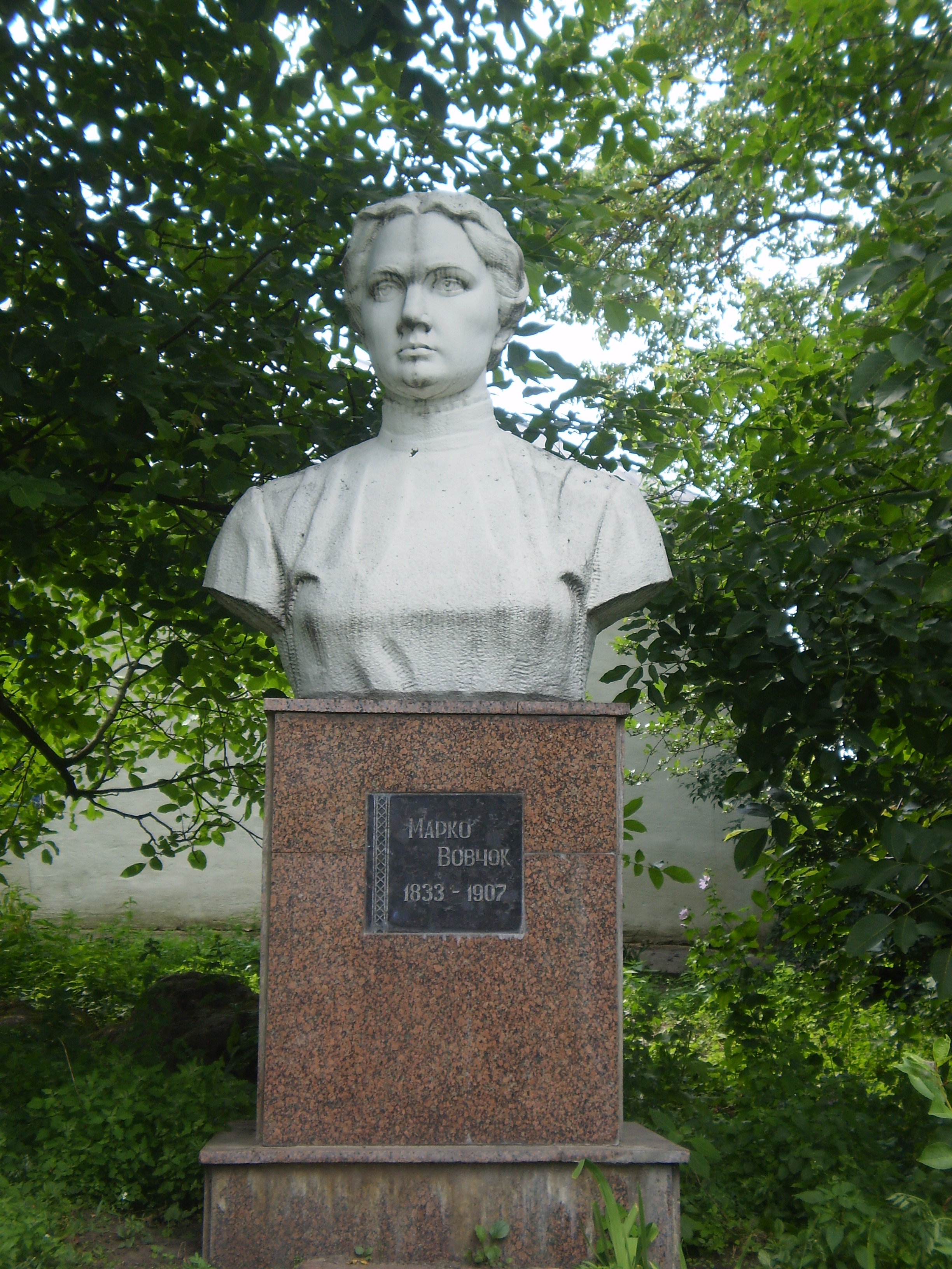 Садиба-музей Марко Вовчок, Богуслав